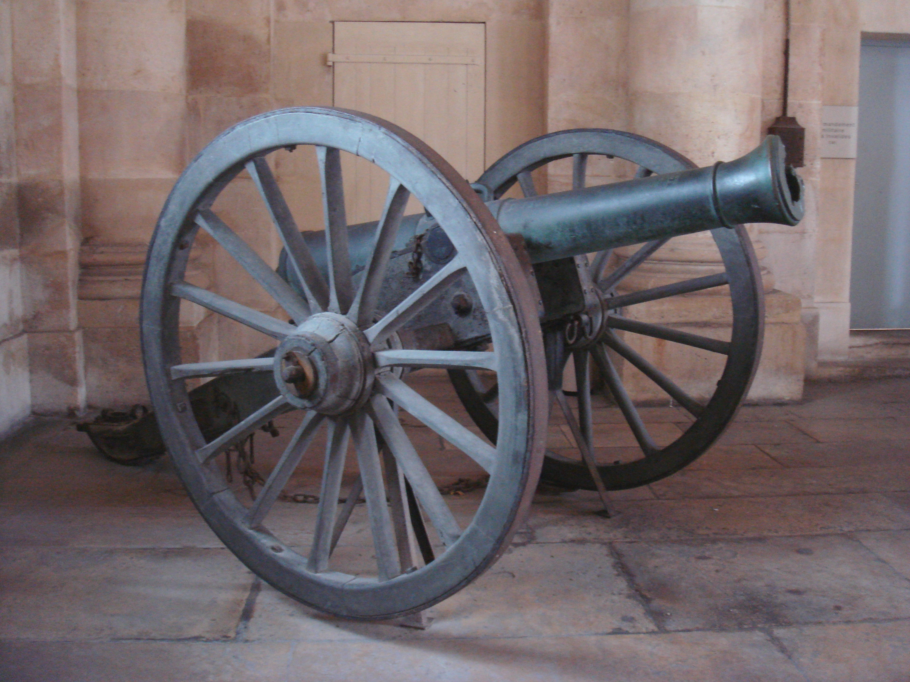 Canon_obusier_de_campagne_de_12_modele_1853